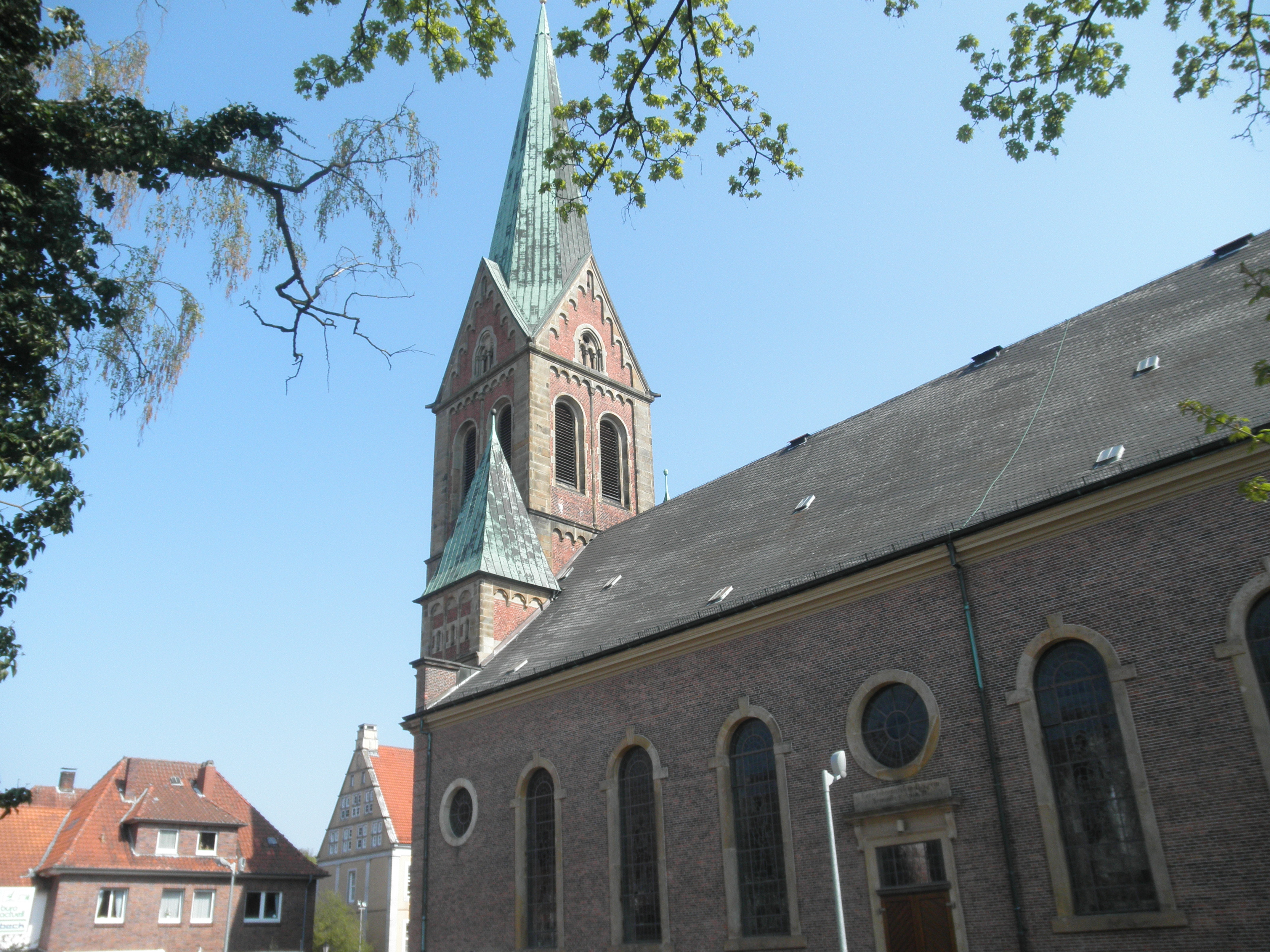 Preĝejo St. Bonifatius en Lingen, Germanio